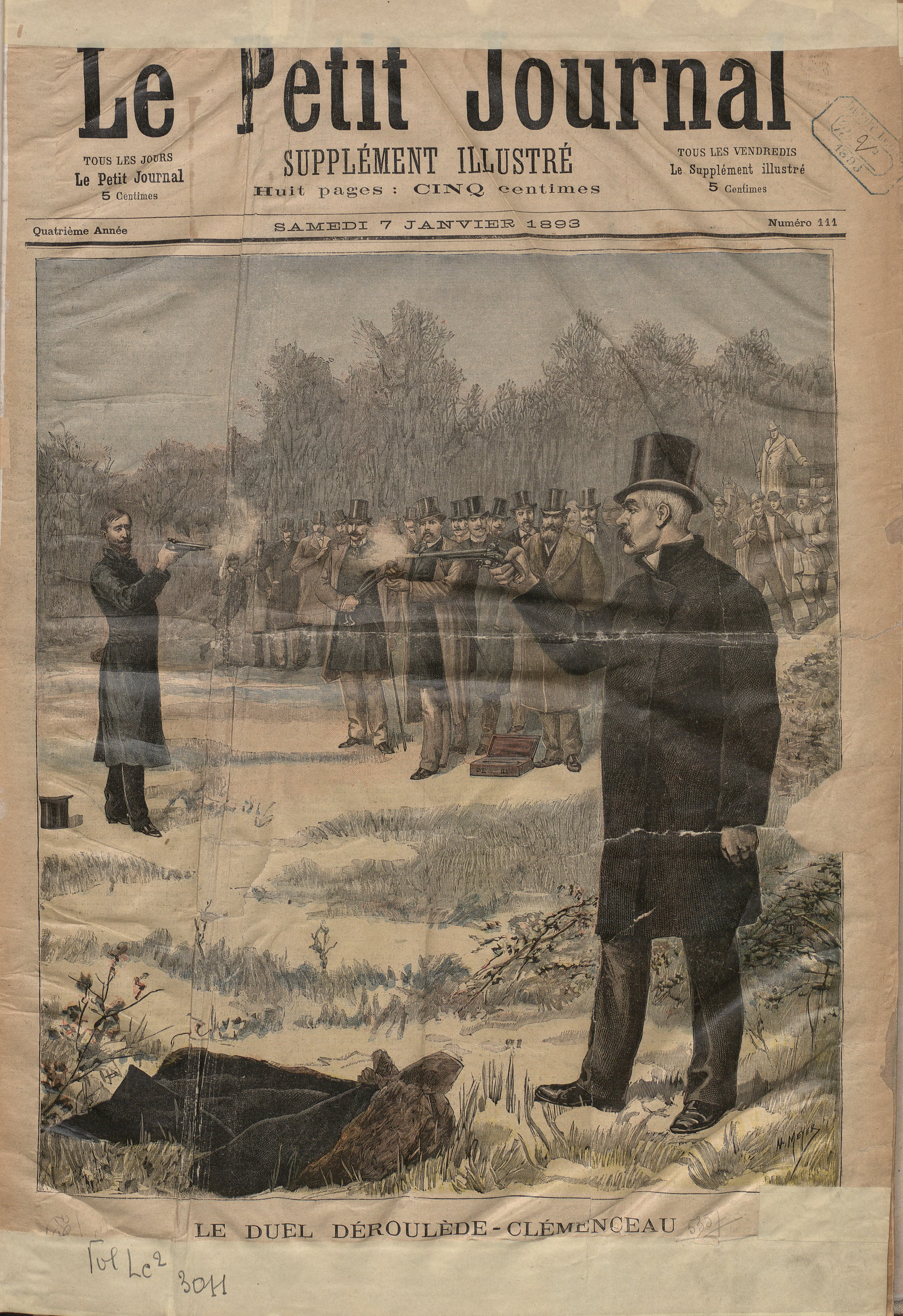 Couverture du Petit Journal illustré : Duel entre Paul Déroulède et Georges Clemenceau.